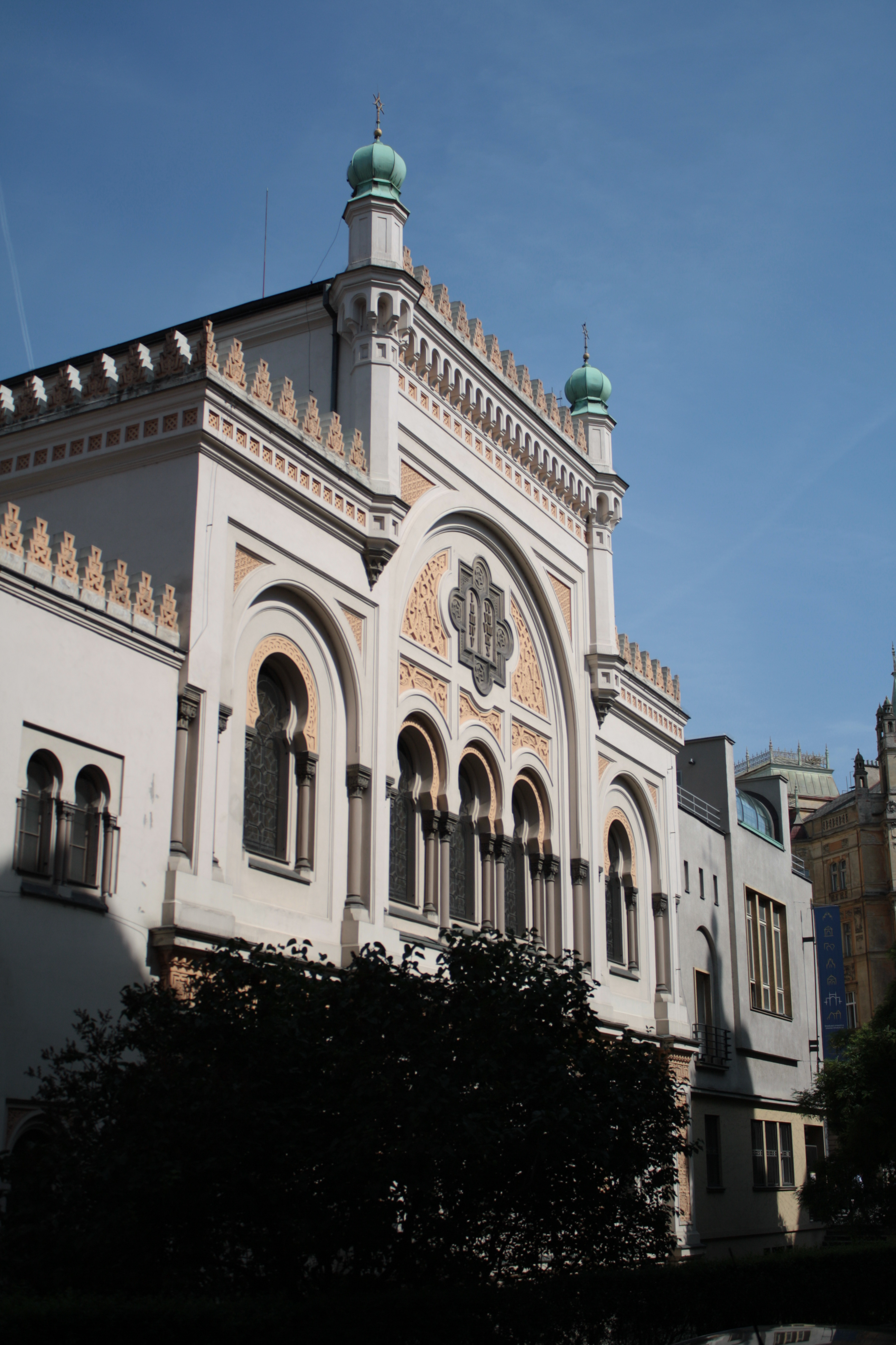 synagoga Španělská, Stará škola, Templ